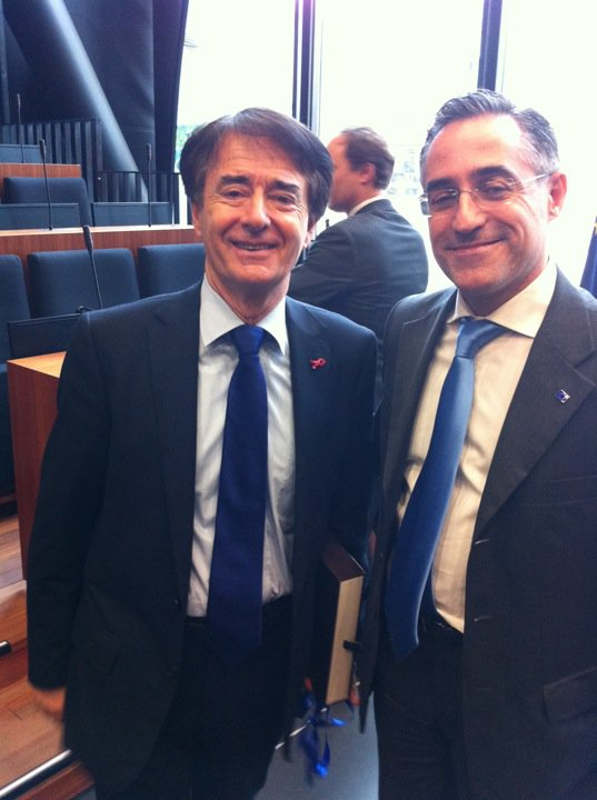 Tremosa i Alduy a la presentació del TEN T Project i presentació de la Perpinyà Mediterrània Comunitat d'Aglomeració